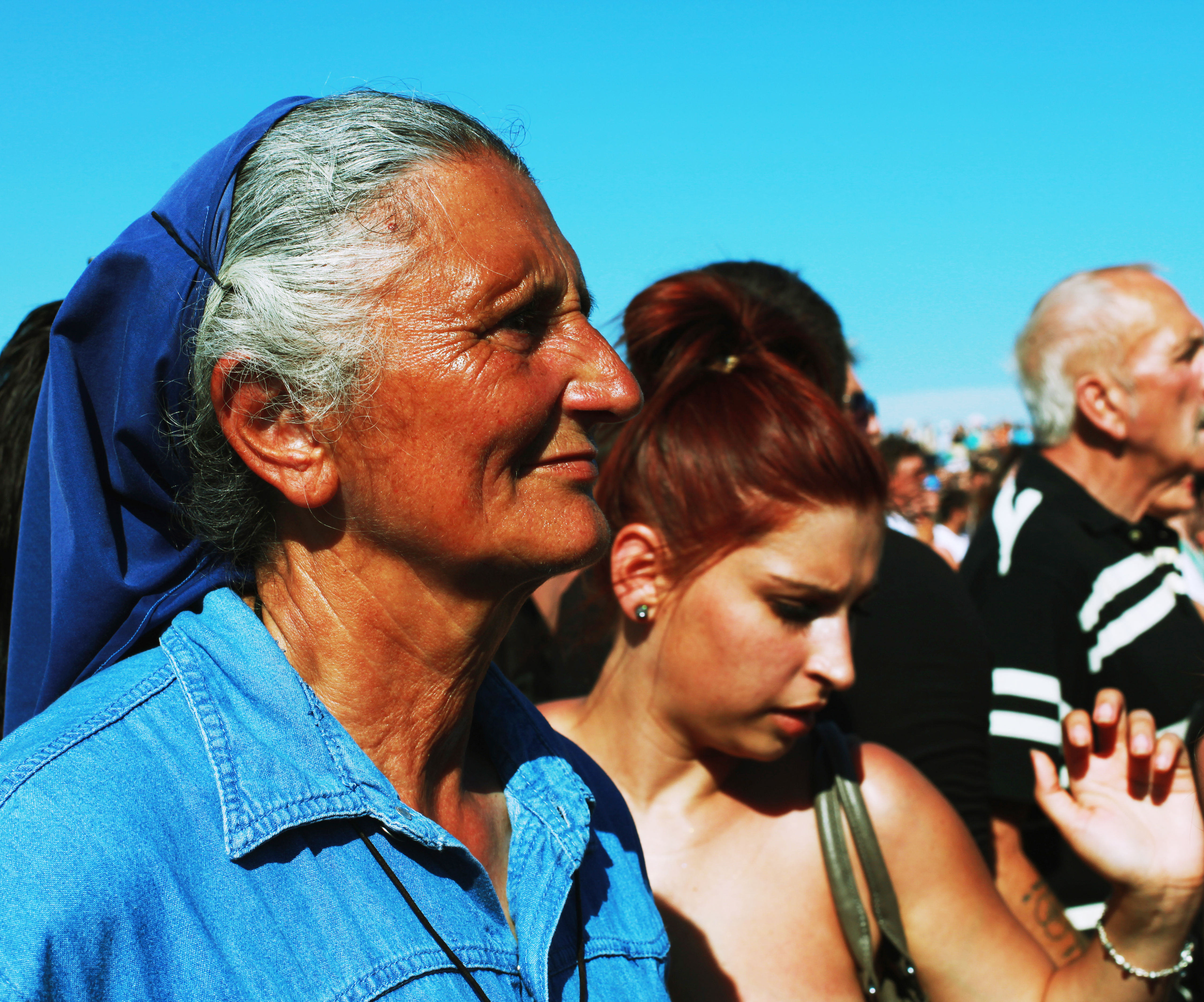 Mère et fille au pèlerinage gitan des Saintes-Maries-de-la-Mer